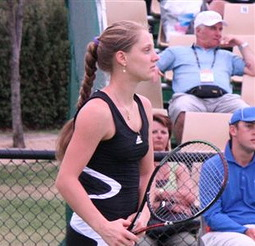 Anna Chakvetadze